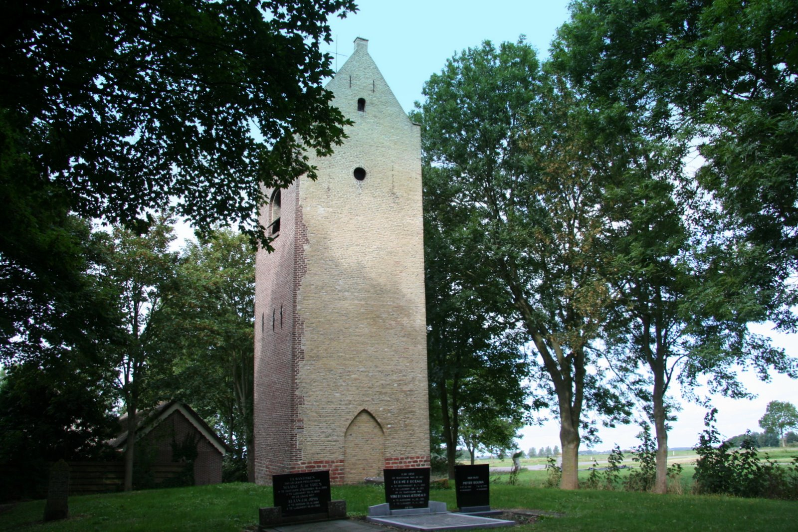 Toren van de voorm. kerk Miedum